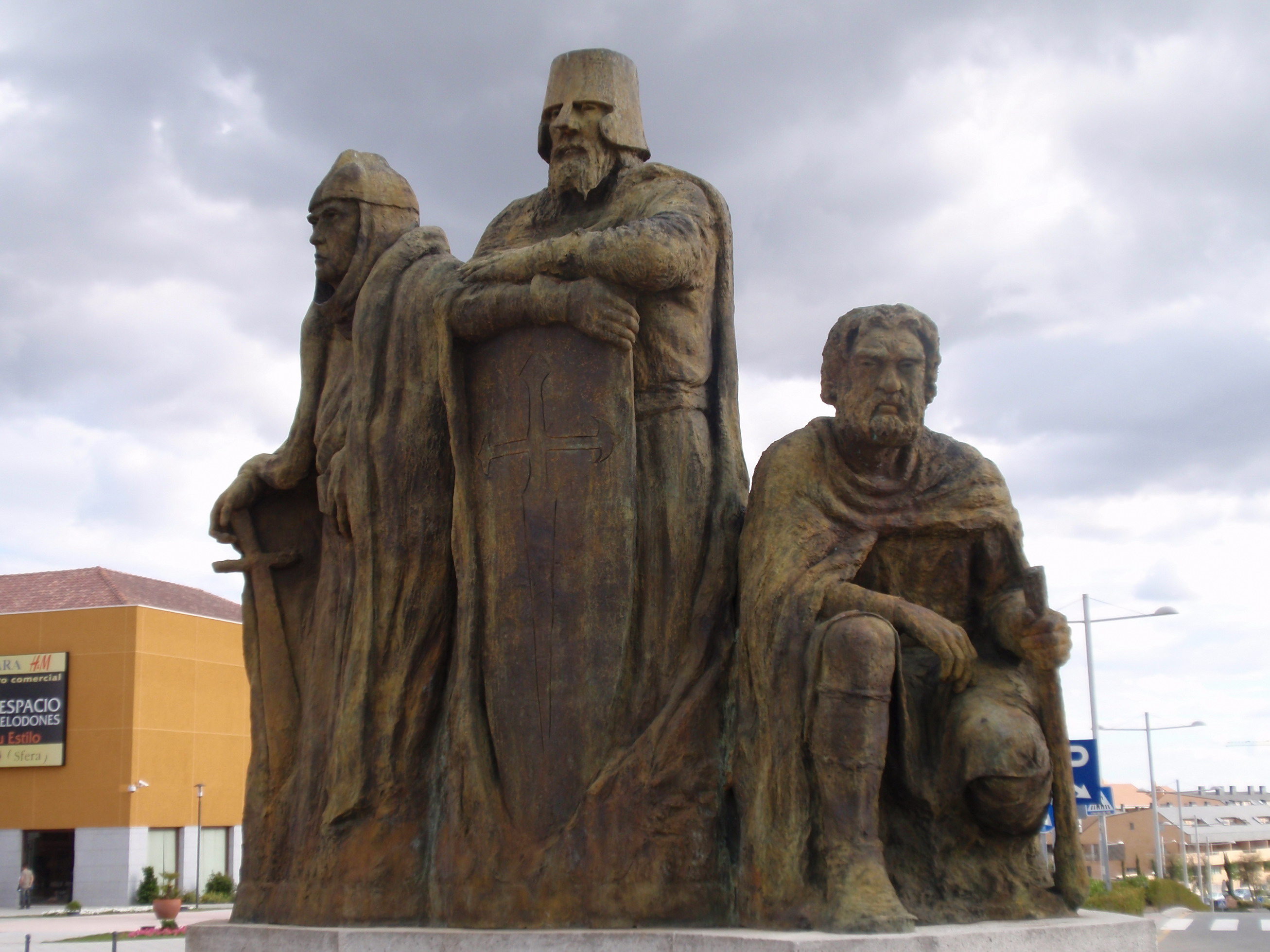 Torrelodones. Monumento VIII Centenario. Vista frontal.